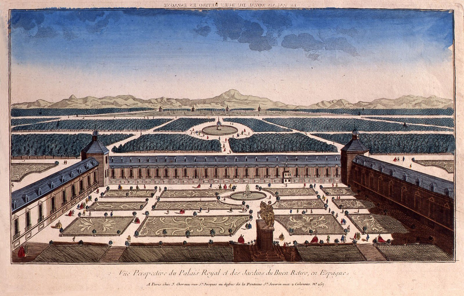 El palacio y jardines del Buen Retiro. Madrid. Grabado coloreado perteneciente a la colección del Museo de Historia de Madrid. En las leyendas figuran los siguientes textos: "Le Palais Royal du Buen Retiro en Espagne (al revés) / "Vüe Perspective du Palais Royal et des Jardins du Buen Retiro, en Espagne. / A Paris chez J. Chereau rue S .t Jacques au dessus de la Fontaine S.t Severin aux 2 Colonnes, N.º 257."